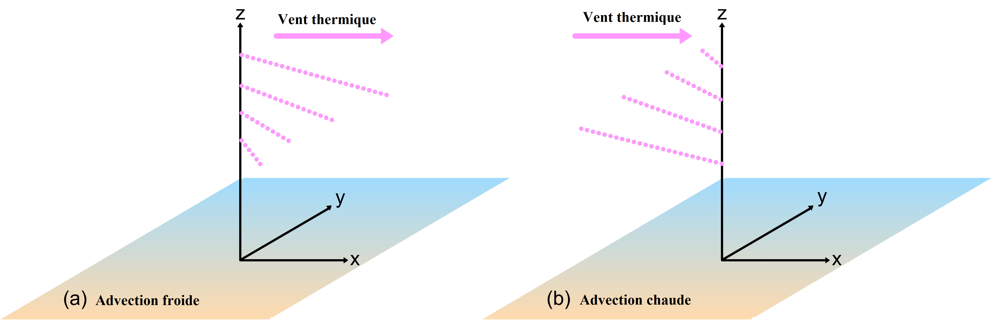 Effet d'une advection froide et chaude dans l'hémisphère nord sur les vents (lignes en tirets) et sur le vent thermiques. Dans une advection froide (gauche), les vents tournent vers la gauche avec l'altitude et dans une advection chaude, ils tournent vers la droite.